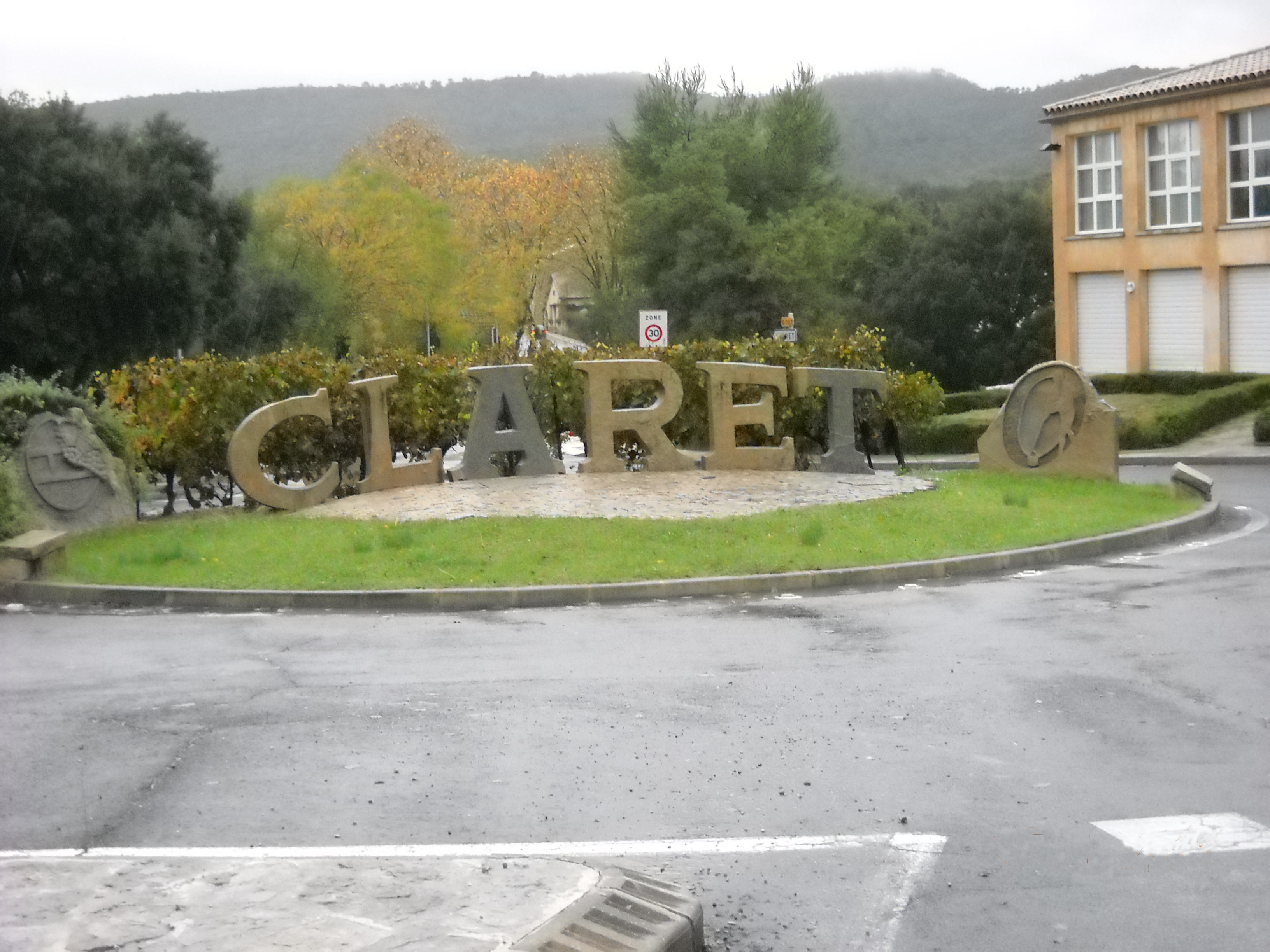 Monument du rond-point de l'entrée avant le pont